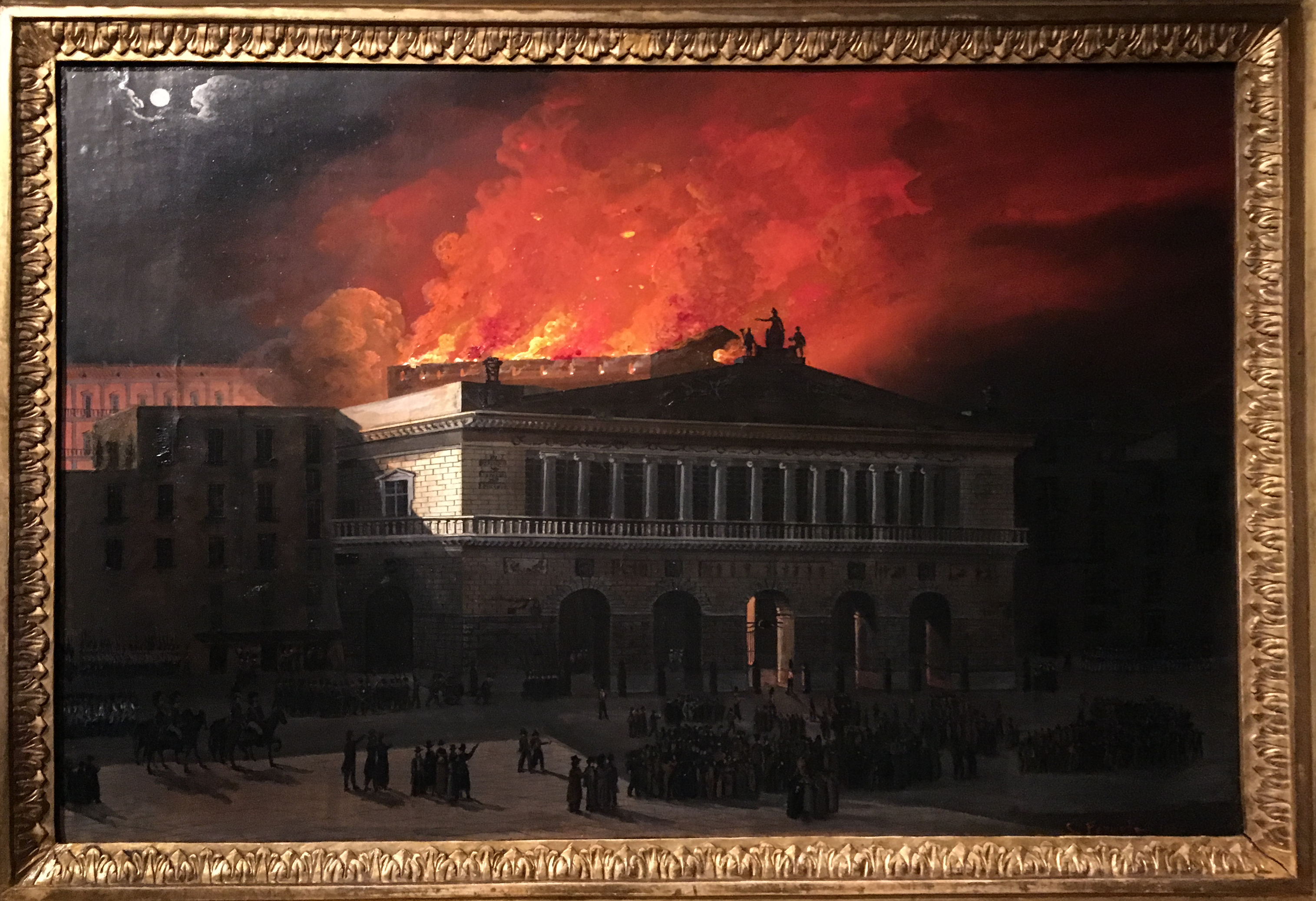 Incendio del Teatro San Carlo del 12 febbraio 1816. (Collezione Palazzo Zevallos, Napoli). "Incendio del Real Teatro San Carlo, olio su carta intelata (37x54), firmato in basso a dx "S.Fergola 1816". In occasione della mostra a palazzo Zevallos Stigliano, sono emersi dubbi sulla firma di Fergola. Infatti viene riportato come "ignoto", attivo nella prima metà del secolo XIX. Lo stesso dicasi per il dipinto "Il Real Teatro San Carlo dopo l'incendio", in questo secondo quadro dopo la pulitura e rimozione delle ridipinture emerse una seconda firma "De Stefano / dipinse 1818". Le firme S. Fergola nei due dipinti sarebbero dunque un camuffamento databile intorno alla metà del 900" (Salvatore Imperato).